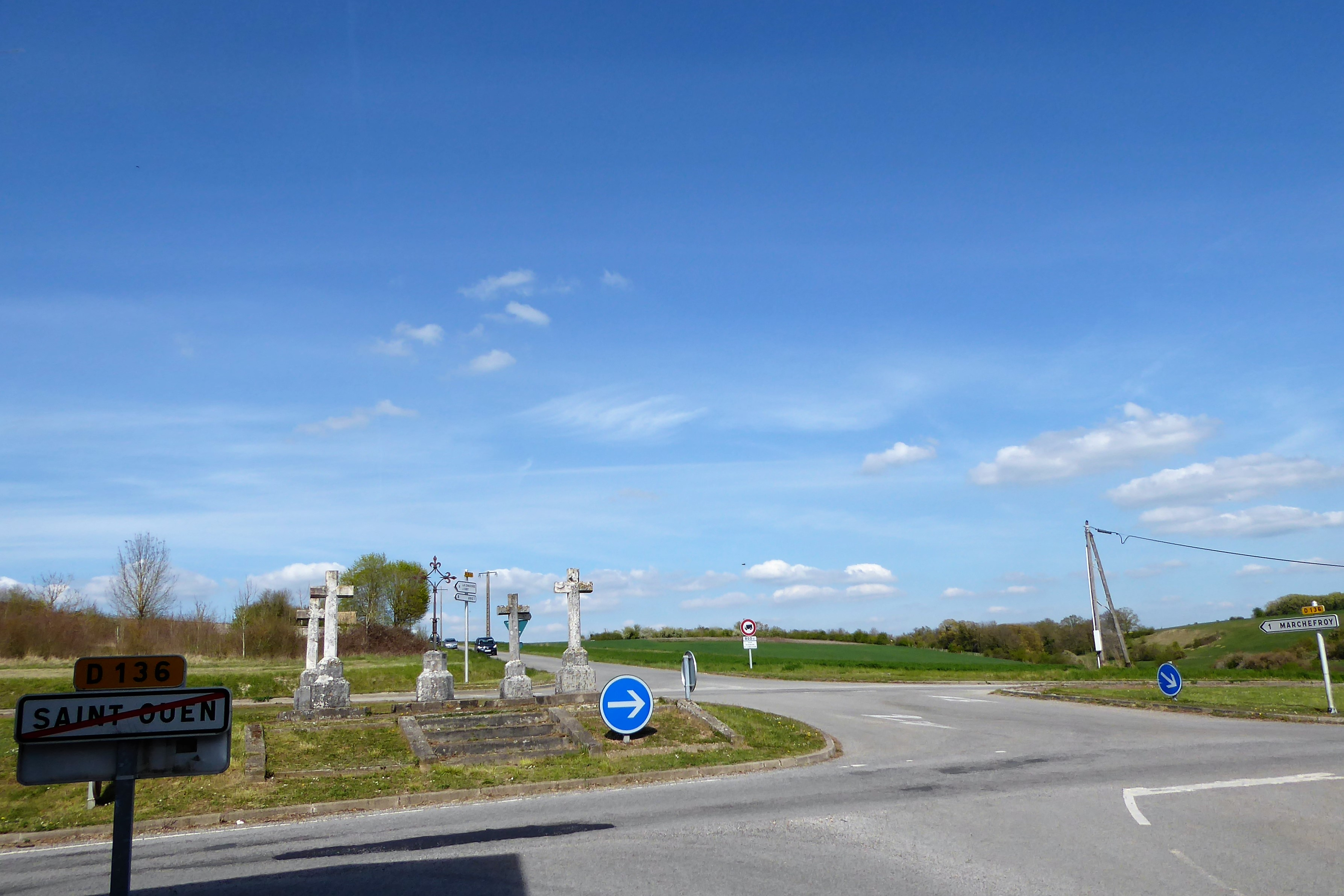 carrefour des Cinq Croix de France, Saint-Ouen-Marchefroy, Eure-et-Loir, France.